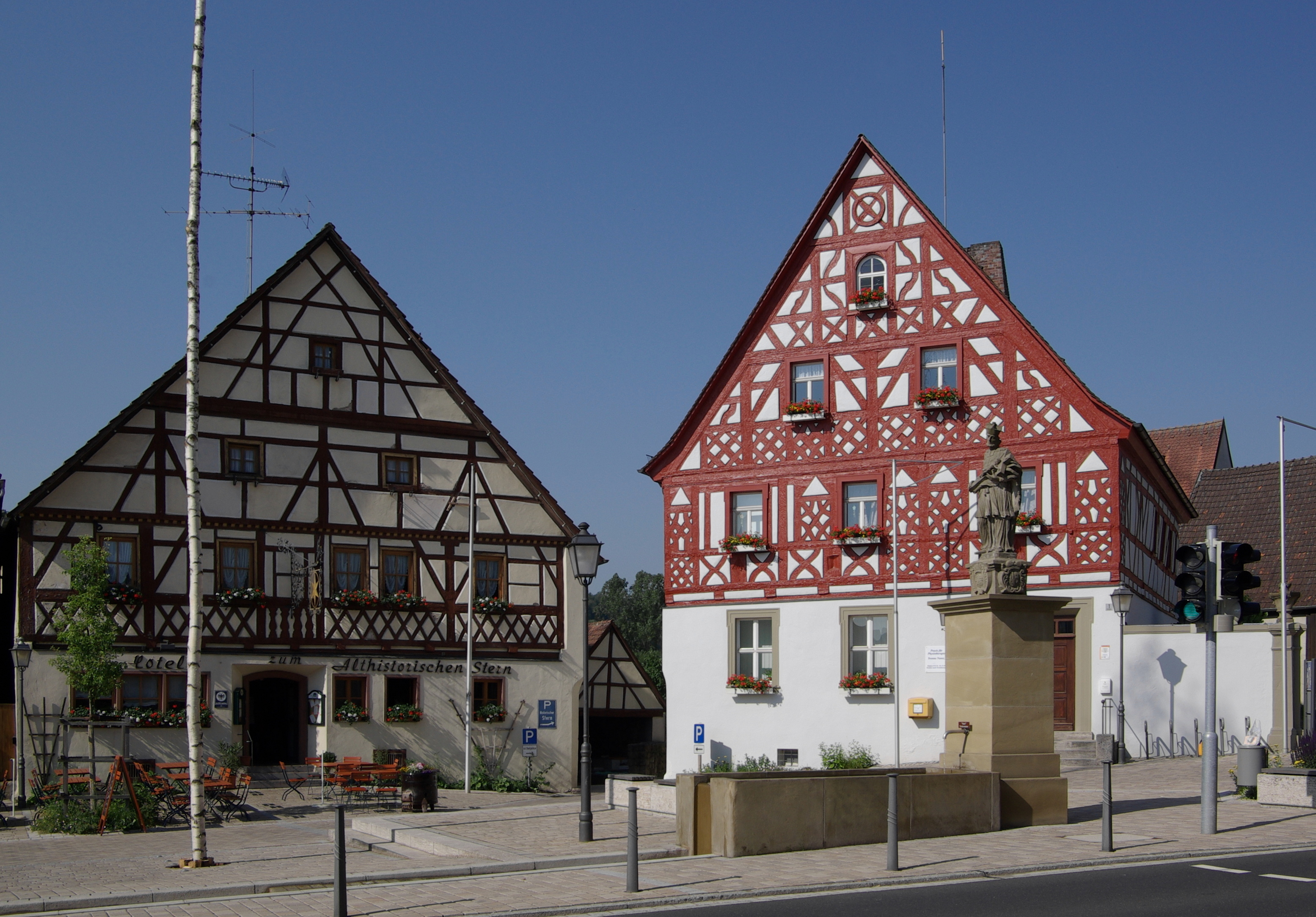 Geiselwind, Marktplatz 1 und 11